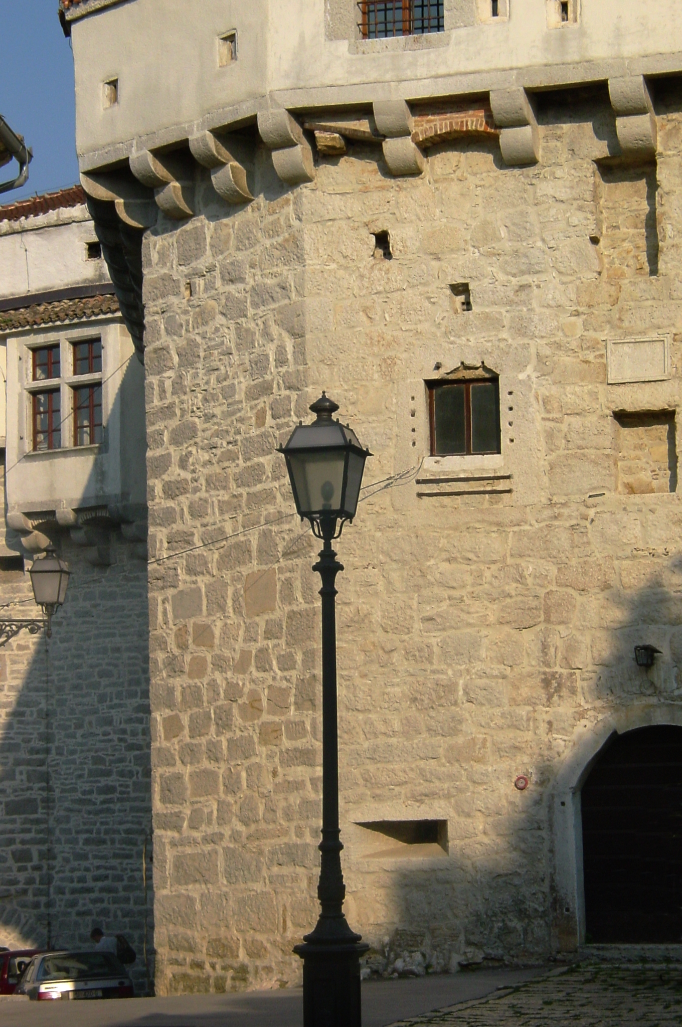 Tour d'entrée du Chateau. Pazin, comitat d'Istrie, Republika Hrvatska( Croatie)